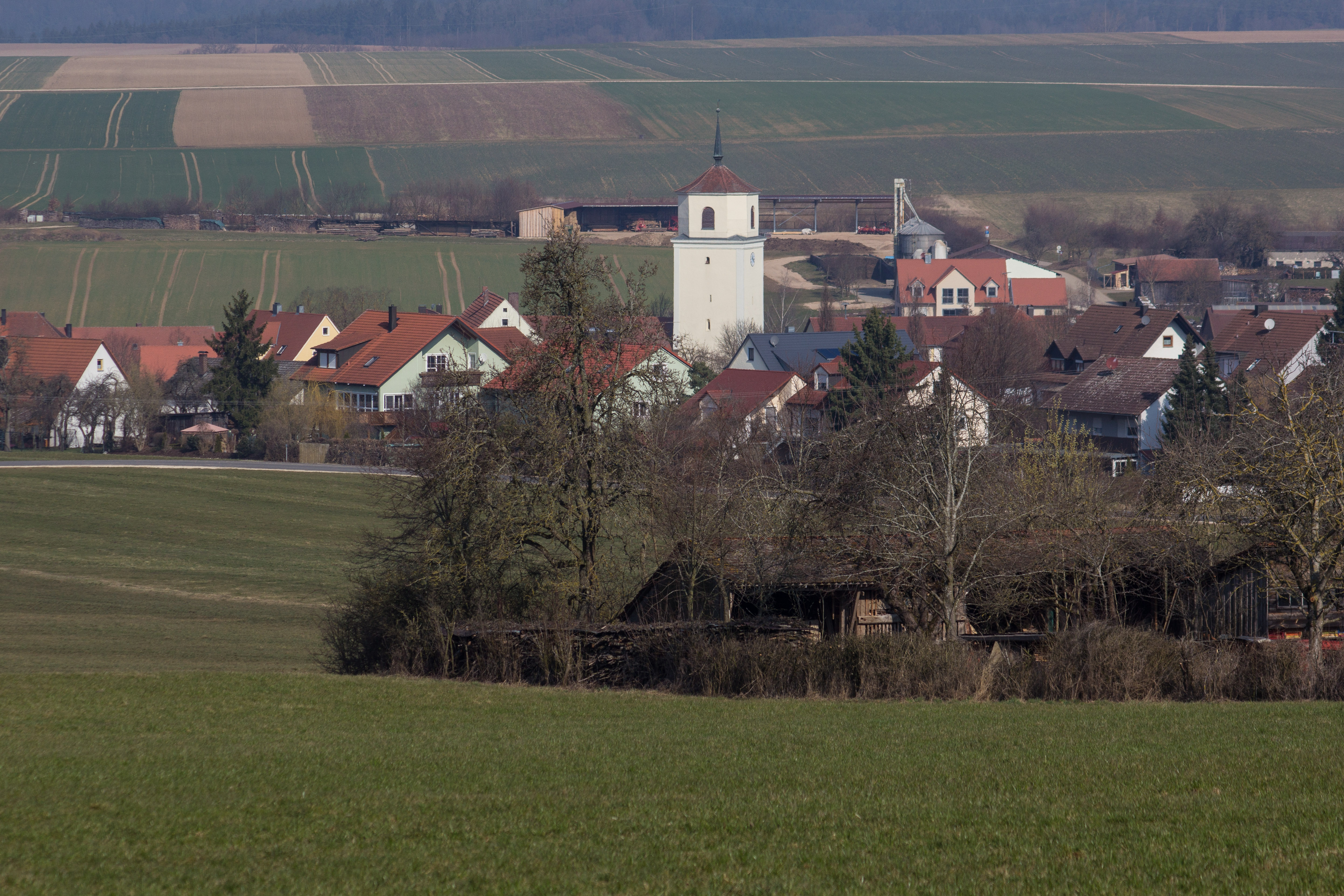 Ettenstatt, Ortsansicht